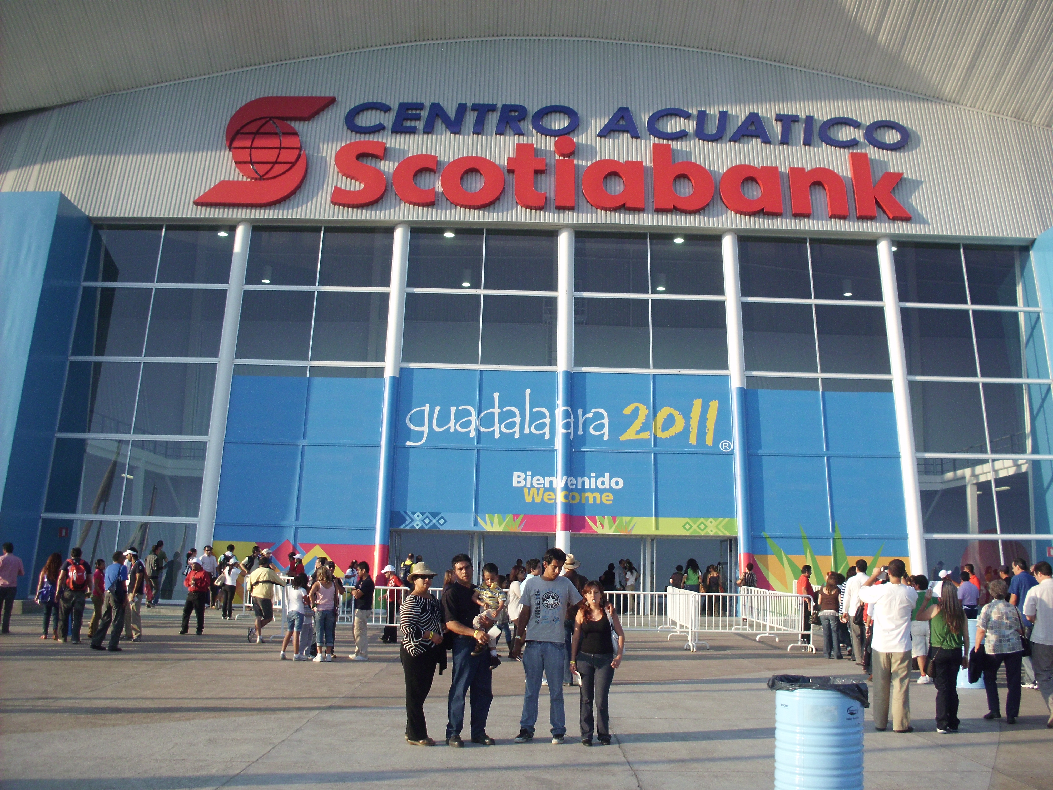 Es una fotografia del centro acuatico scotiabank donde se llevaron a cabo las pruebas de natacion, polo acuatico, nado sincronizado y clavados durante los juegos panamericanos 2011 y donde se llevara a cabo el mundial de natacion 2017